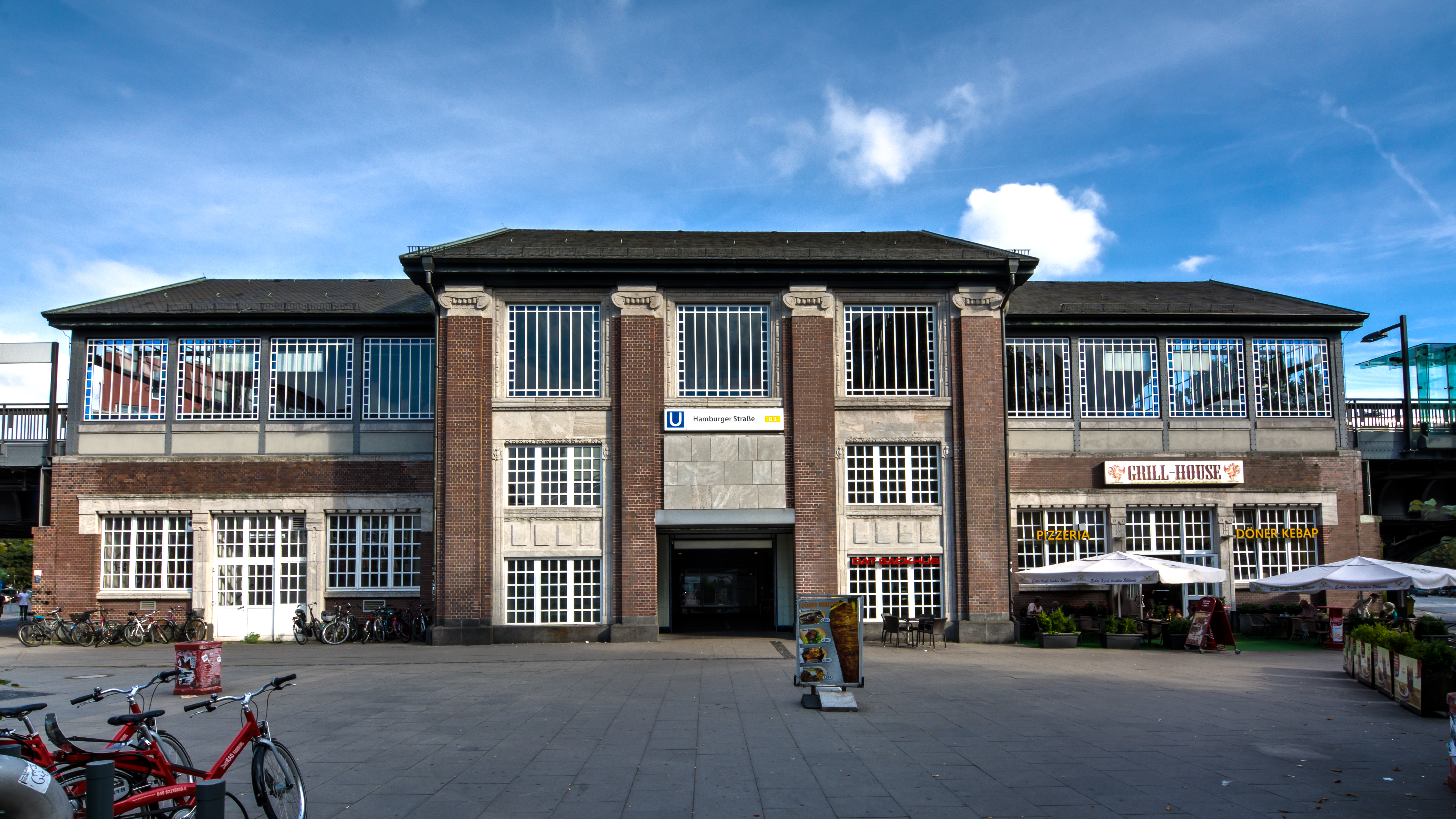 U-Bahnhof Hamburger StraßeThis is a photograph of an architectural monument.